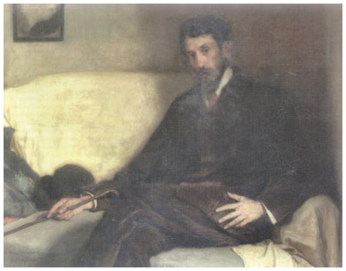 Portrait d'Emmanuel Viérin par Frans Van Holder (1907). Huile sur toile (102 x 133 cm). Musée Communal de la ville de Courtrai (don d'Emmanuel Viérin, petit-fils du peintre).